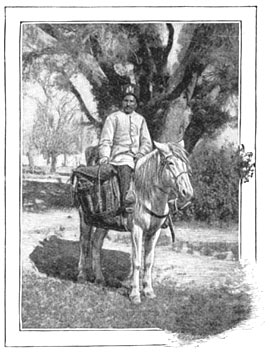 "Perzische pony"